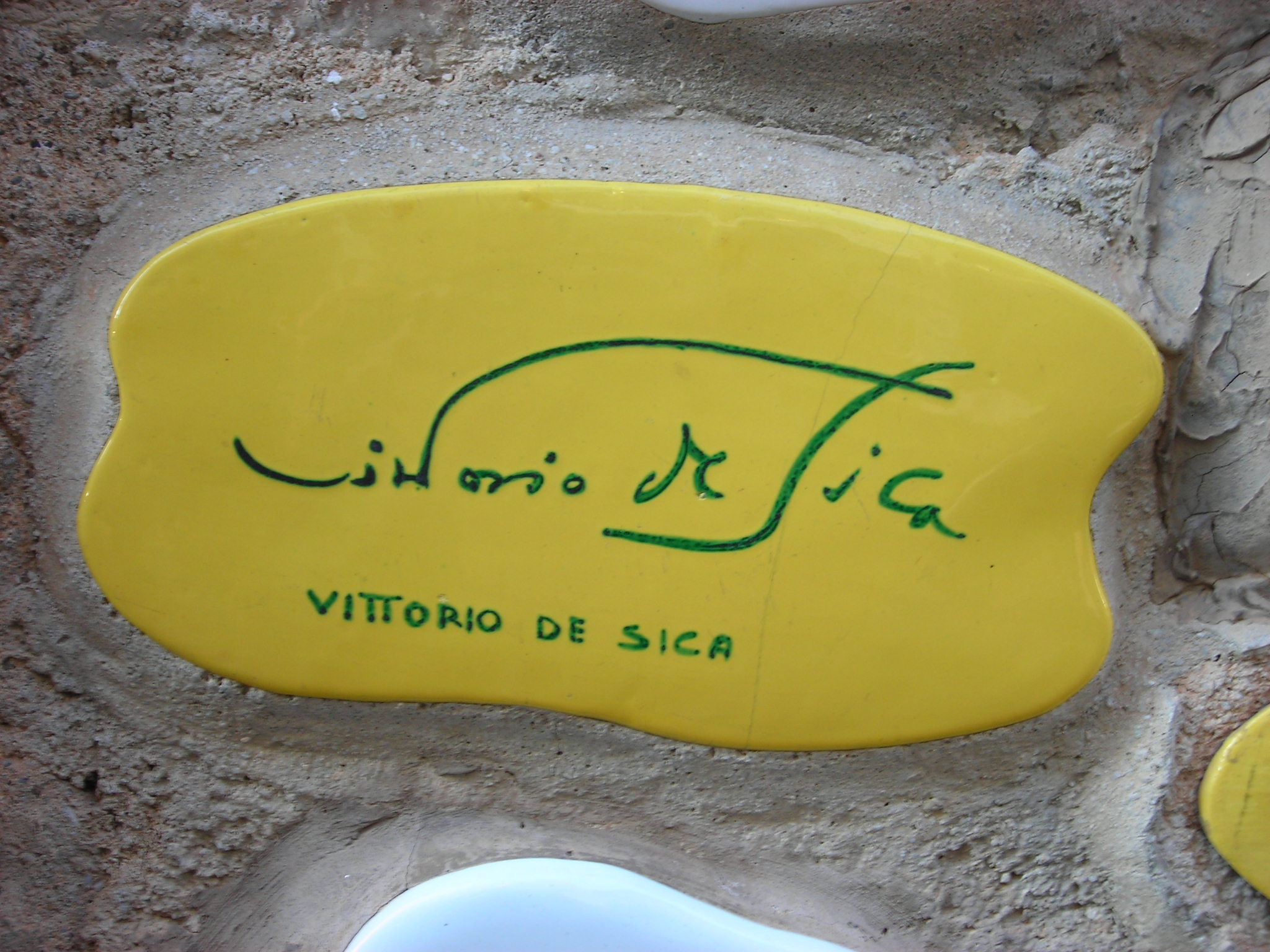 Piastrella del Muretto di Alassio autografata da Vittorio De Sica